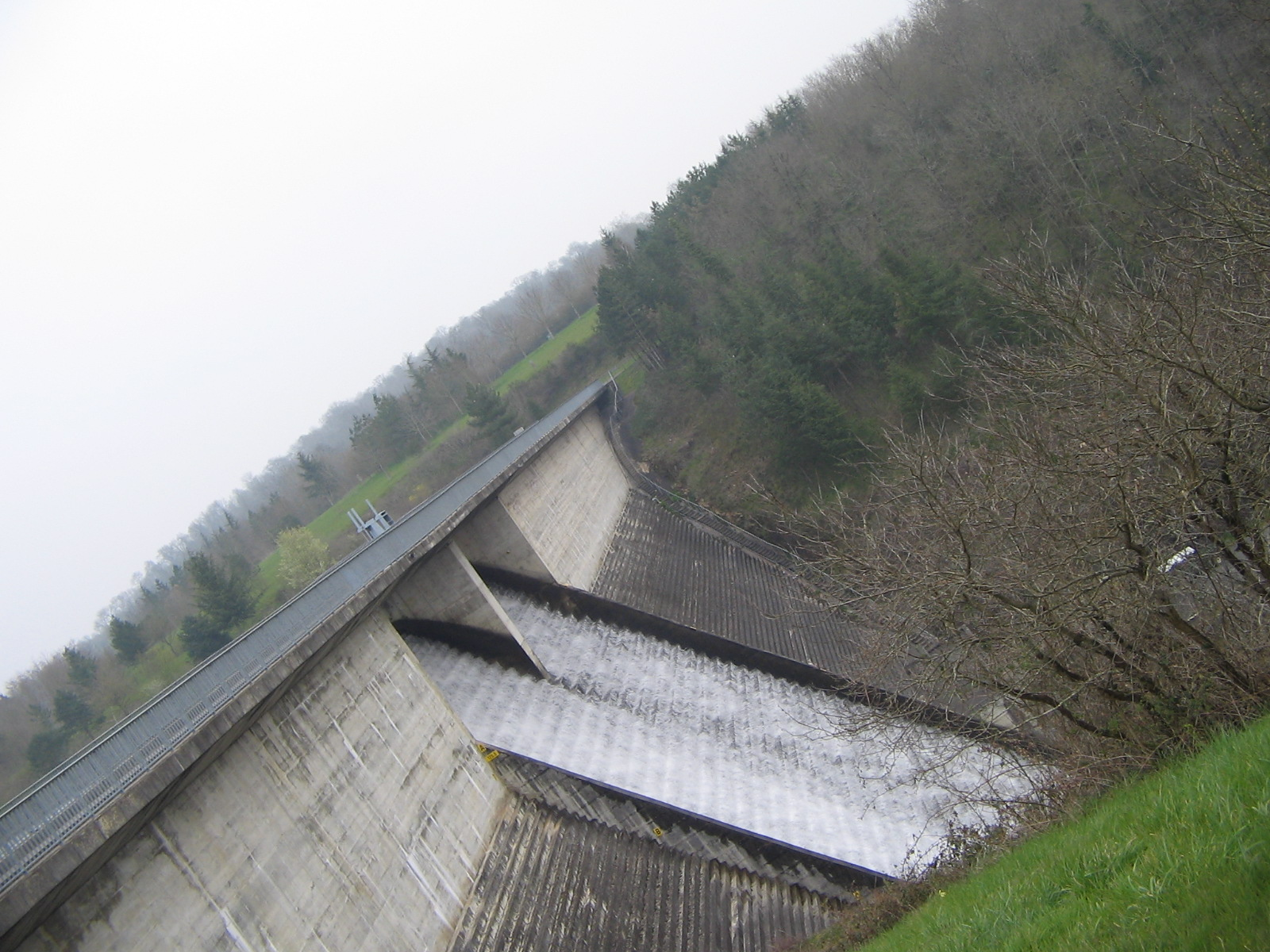 le barrage de la touche poupard dans les deux sèvres en avril 2013